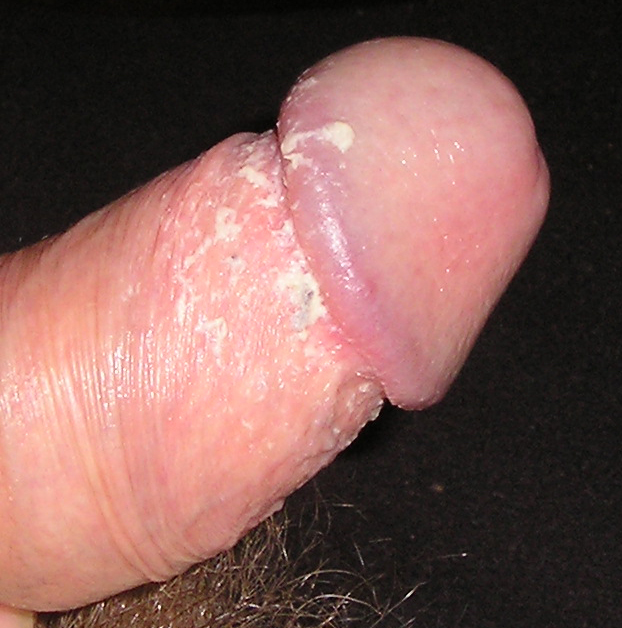 Smegma